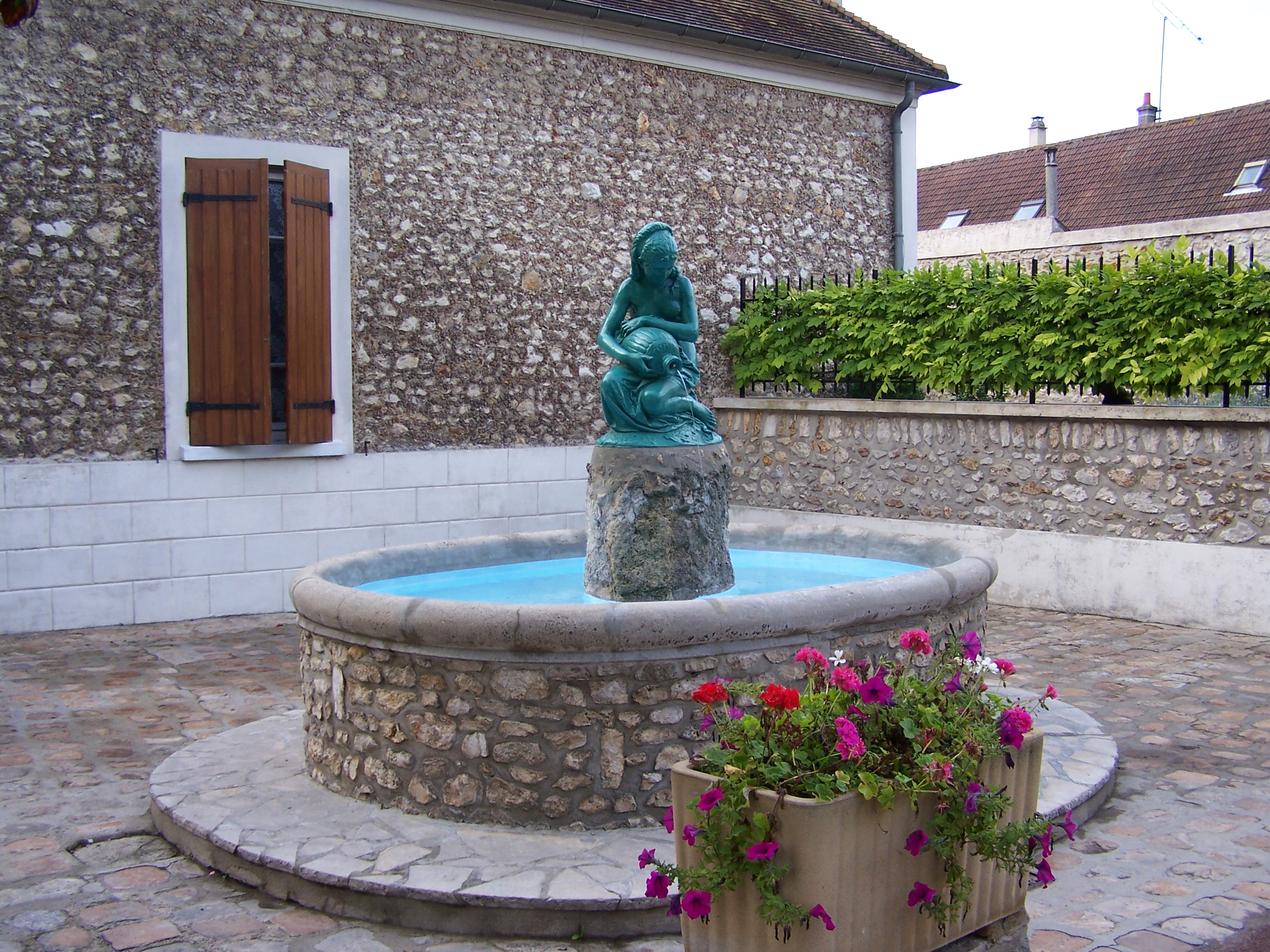 Fontaine de Garancières (Yvelines, France)